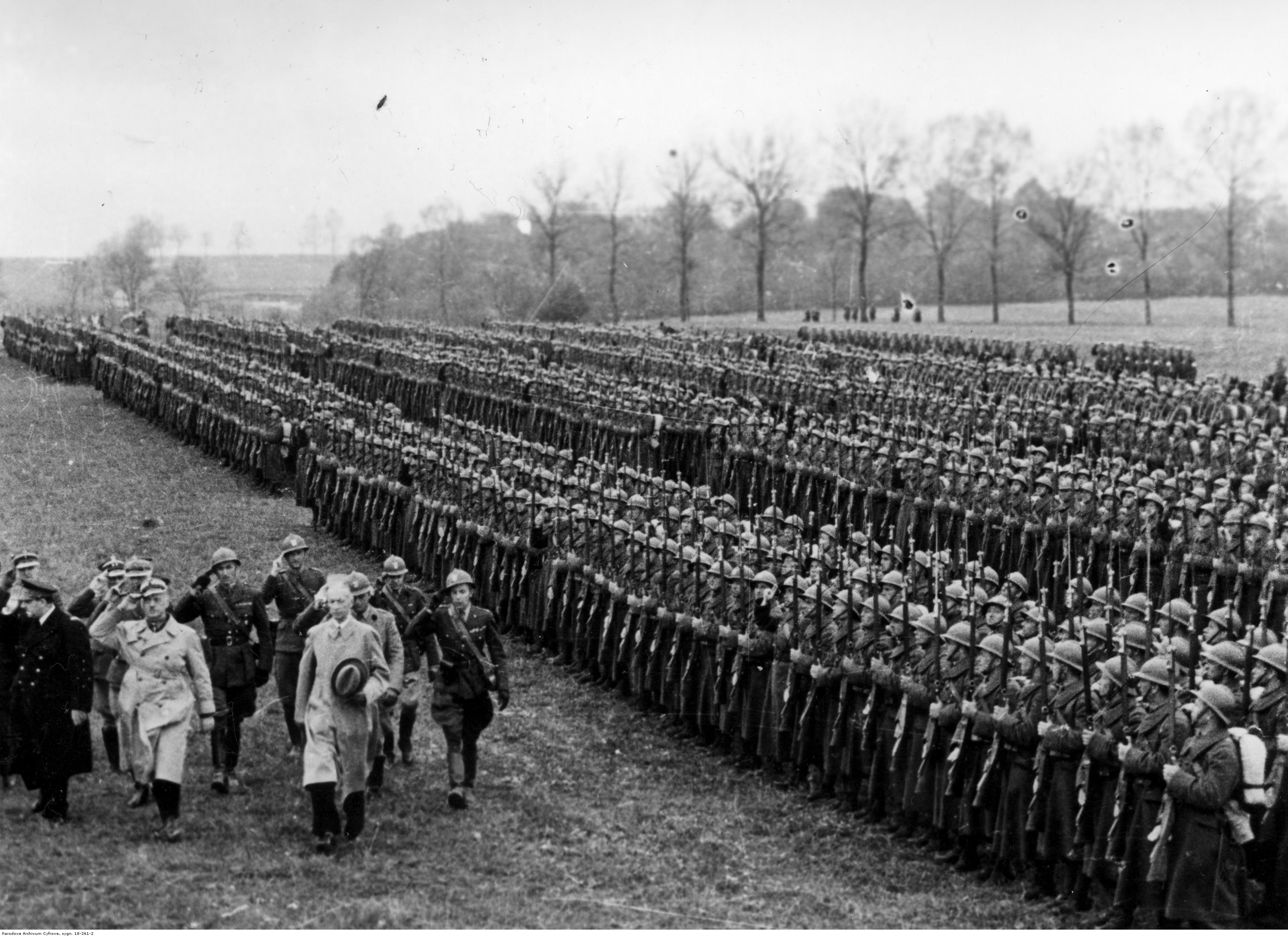 1 Dywizja Grenadierów Wojska Polskiego we Francji - obchody święta 3 Maja i uroczystość nadania miana Grenadierów odbywające się przy szosie Autreville-Martigny - przegląd pododdziałów. Widoczni m.in. prezydent RP Władysław Raczkiewicz i gen. Władysław Sikorski. Archiwum Fotograficzne Czesława Datki. Sygnatura: 18-261-2